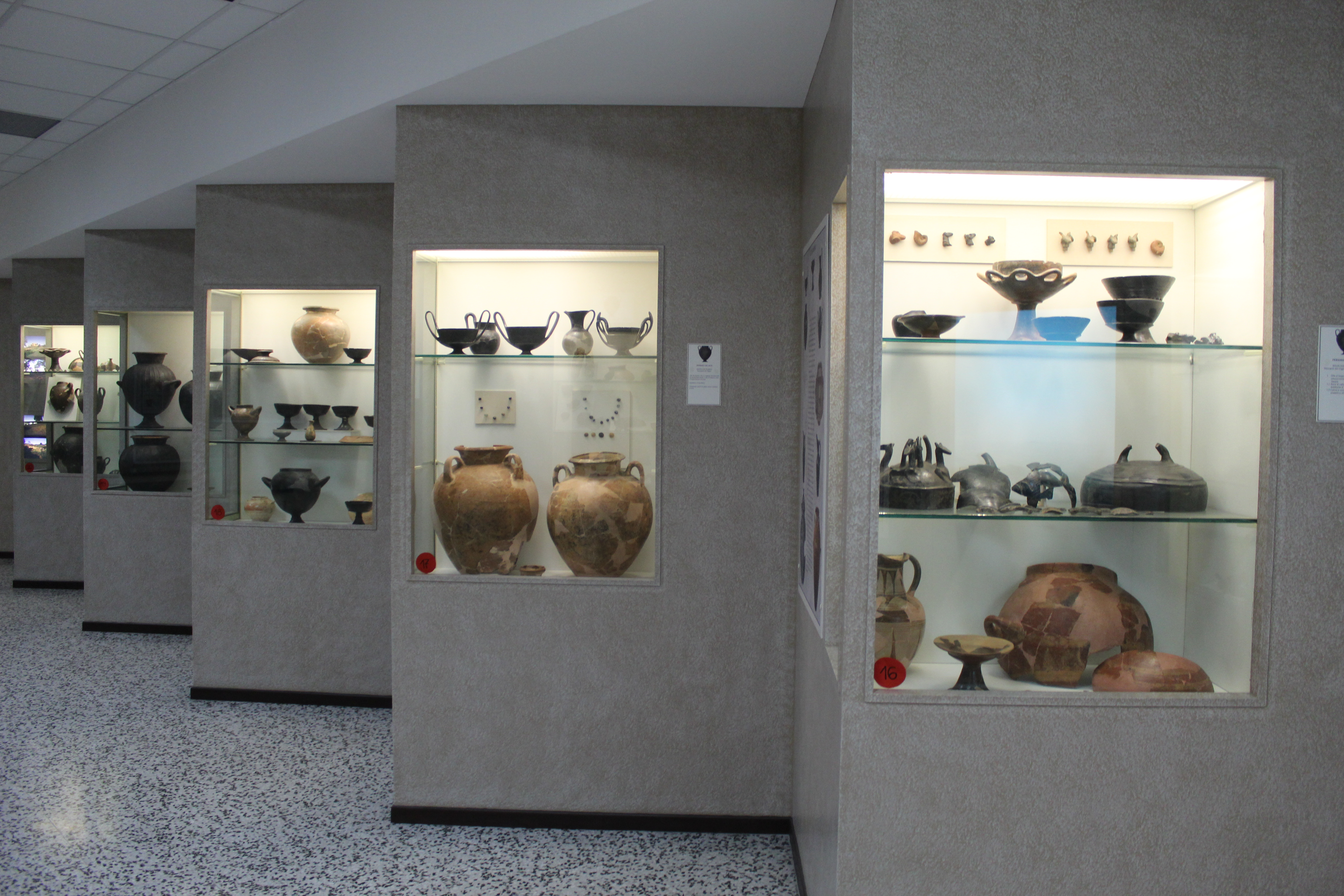 Museo Archeologico di Magliano Sabina, primo piano, sala espositiva 3, Reperti sabini (manufatti di uso quotididiano e decorativi).